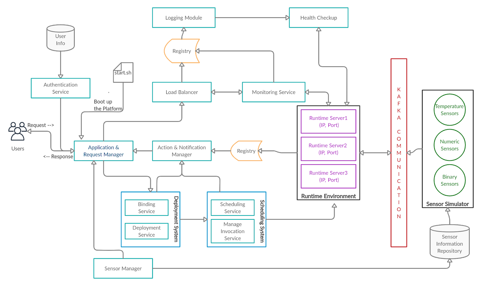 सिस्टम में मॉड्यूल कनेक्टिविटी की एक बुनियादी वास्तुकला